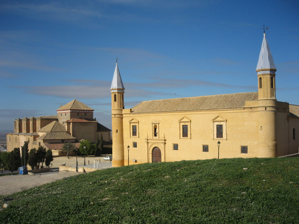 Vista de la Universidad de Osuna, al fondo la Colegiata, en Osuna-Sevilla-Andalucía-España